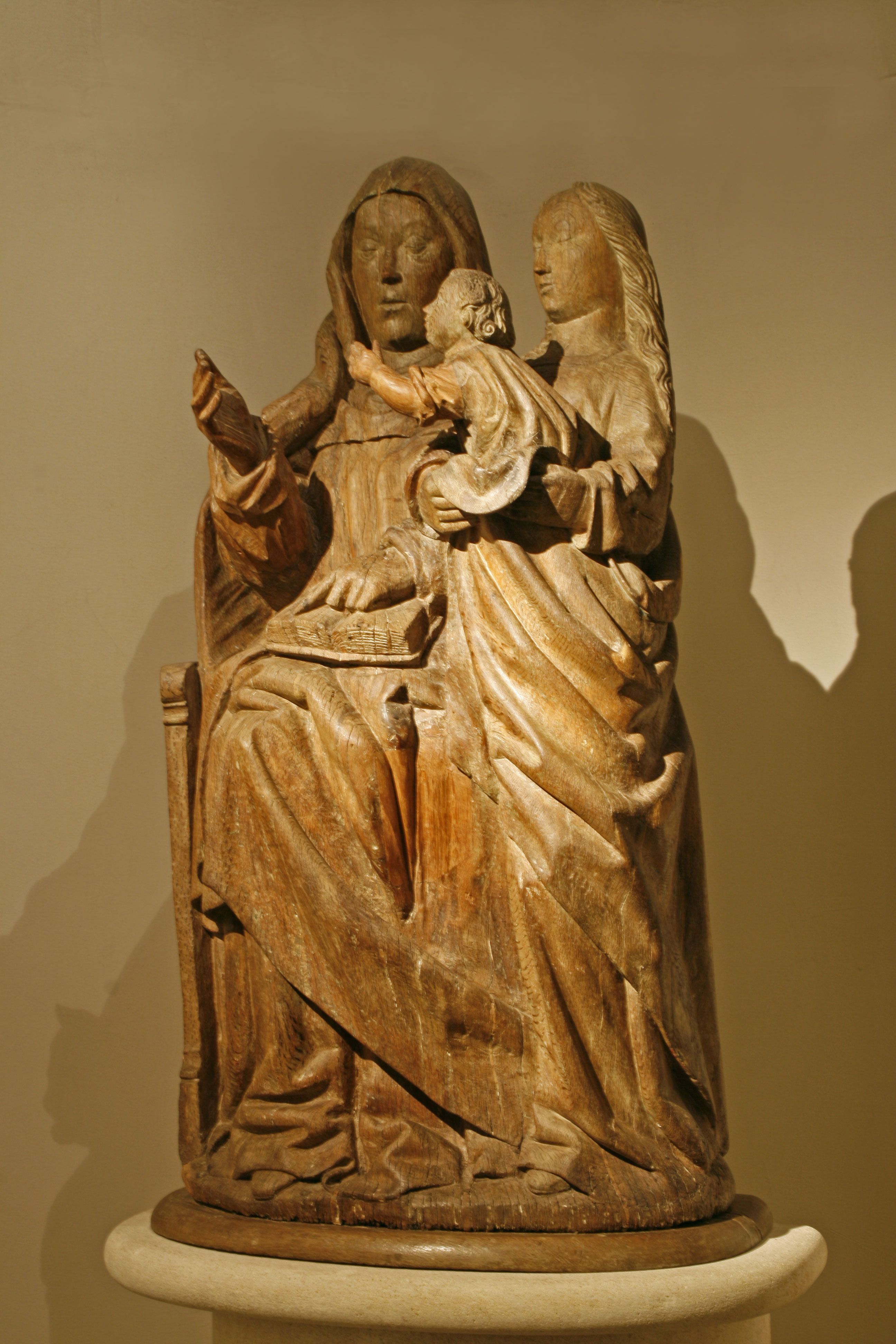 Talk:Muttergottes, d'Jesuskand an déi helleg Anna an der Welleschter Kierch.